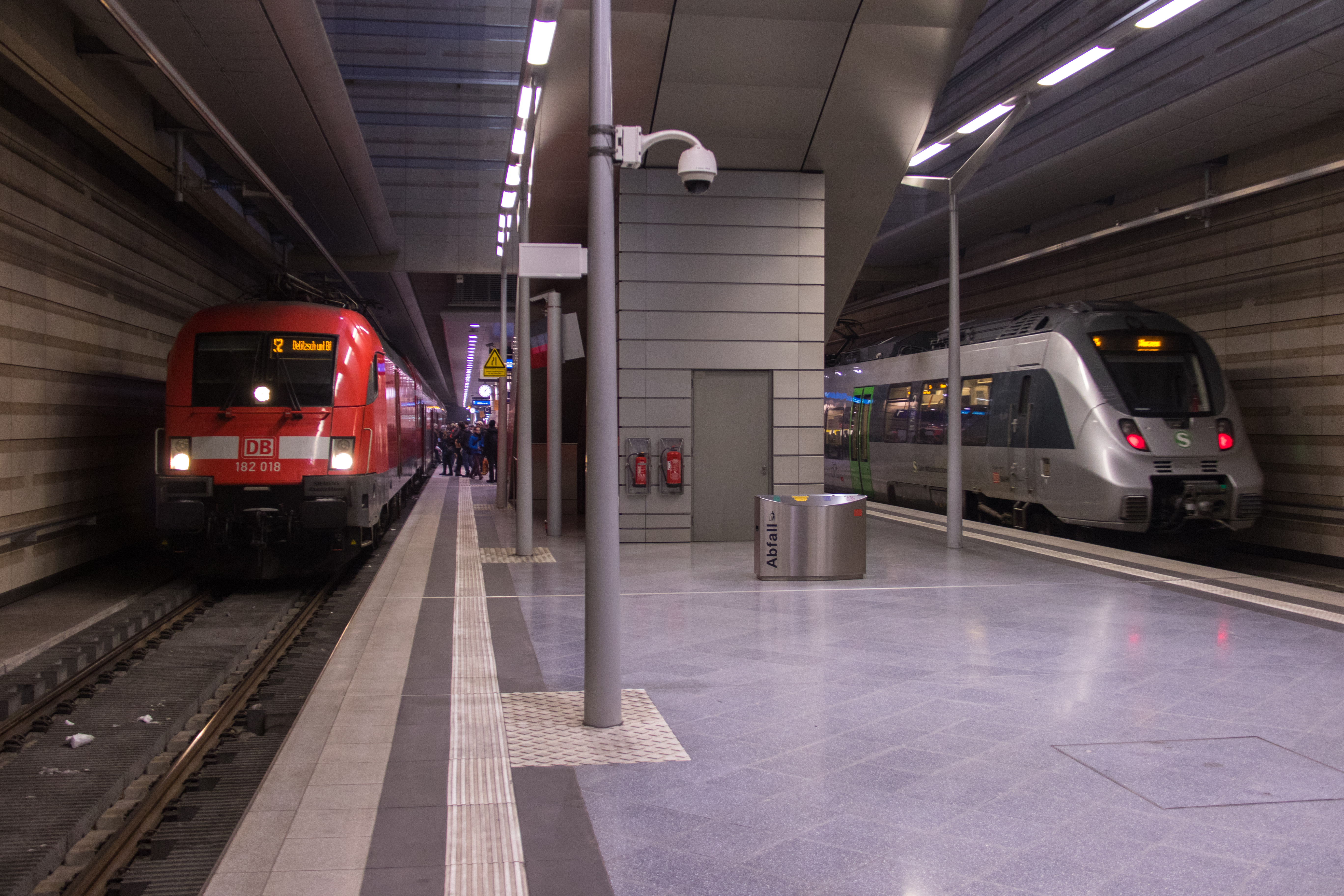 S2 mit lokbespannter (BR 182) Zugeinheit mit 3 modernen Doppelstockwagen sowie Talent 2 Zug der S-Bahn Mitteldeutschland am Hauptbahnhof Leipzig